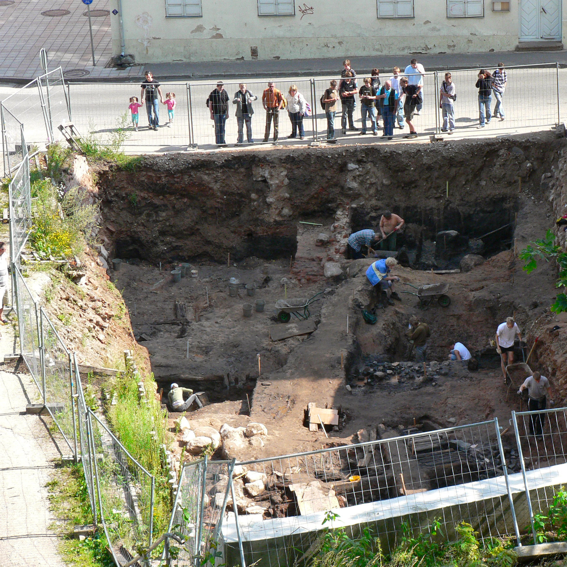 Arheoloogilised väljakaevamised Tartus Ülikooli 14.